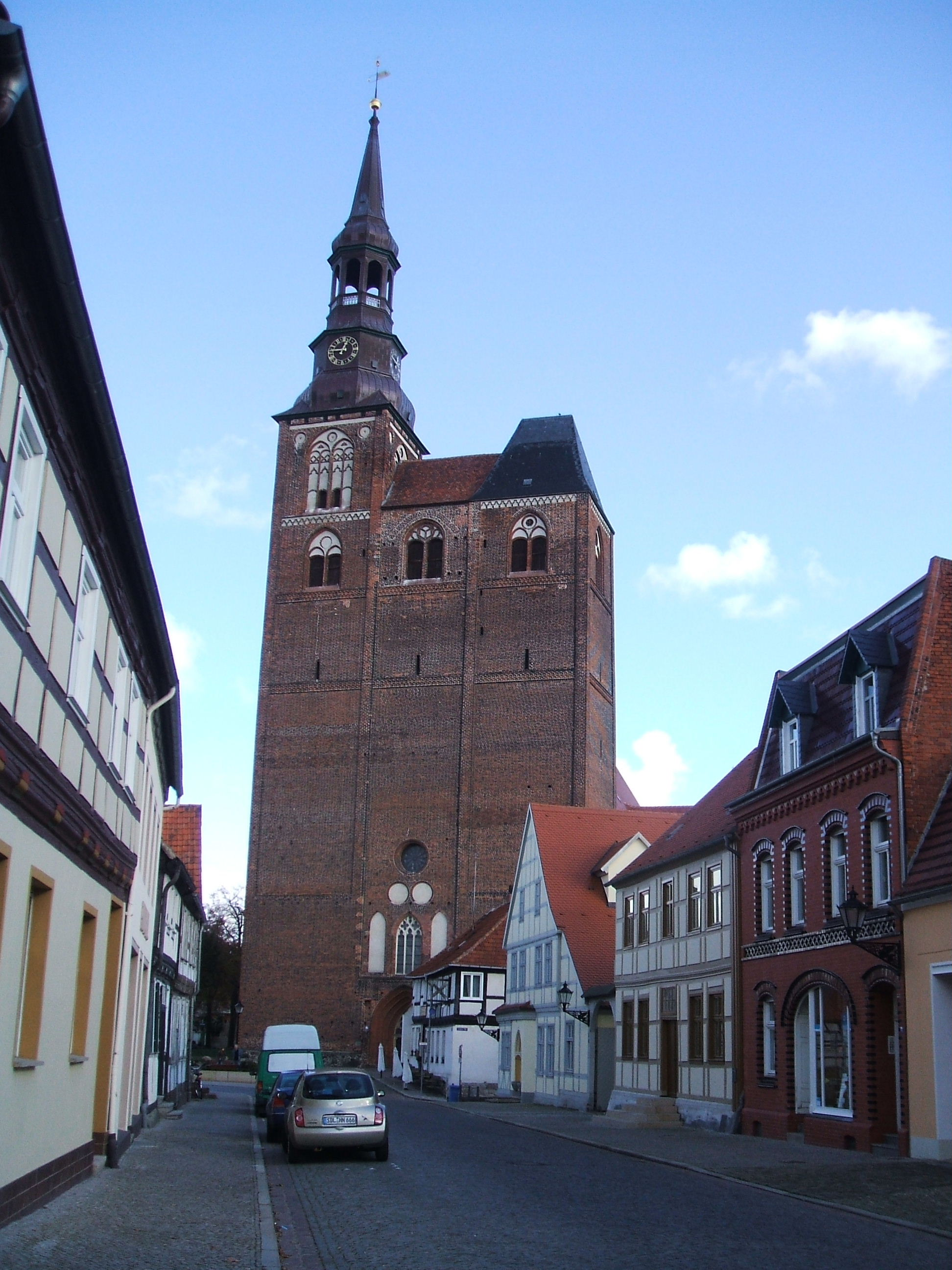 Tangermünde,_Stephanskirche